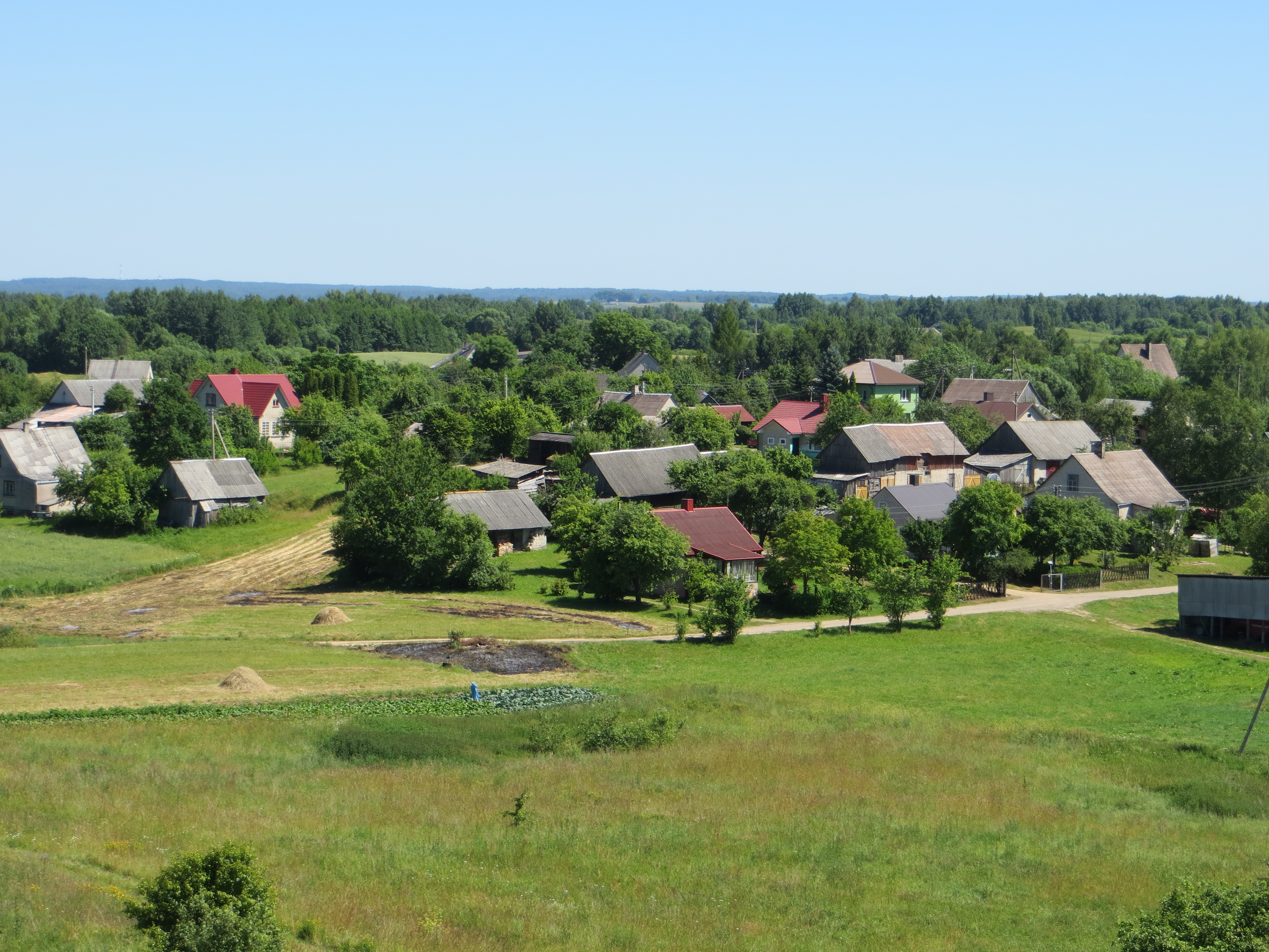 Pakalniškės, Lithuania